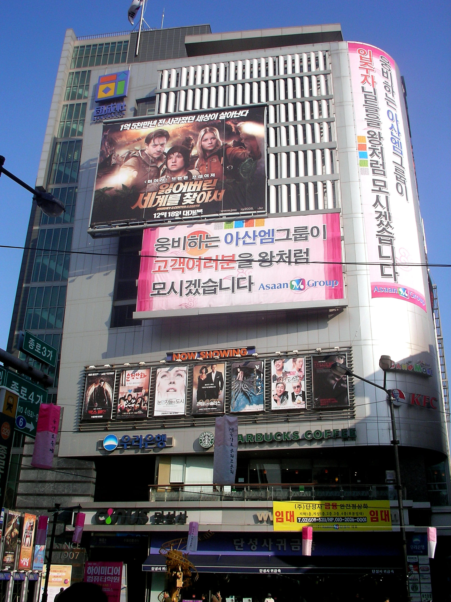 Dansungsa (단성사)